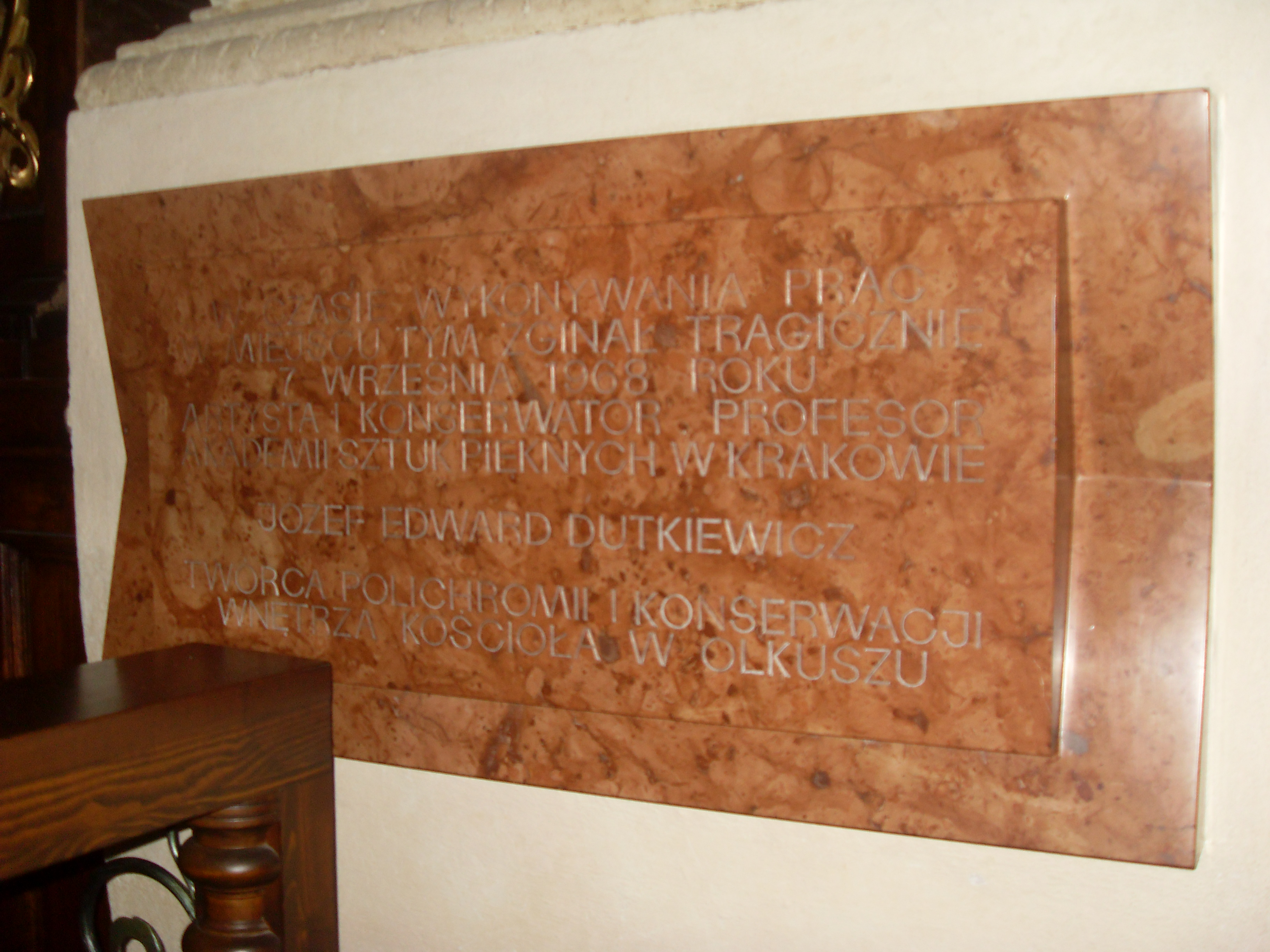 Tablica pamiątkowa w miejscu gdzie zabił się Józef Dutkiewicz, kość. św. Andrzeja w Olkuszu